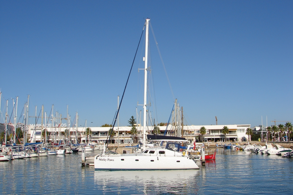 Lagos Valter Jacinto